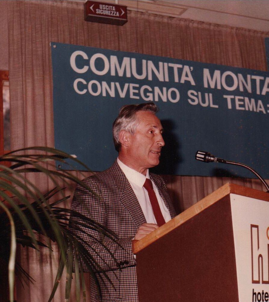 ing.Donato Sabato